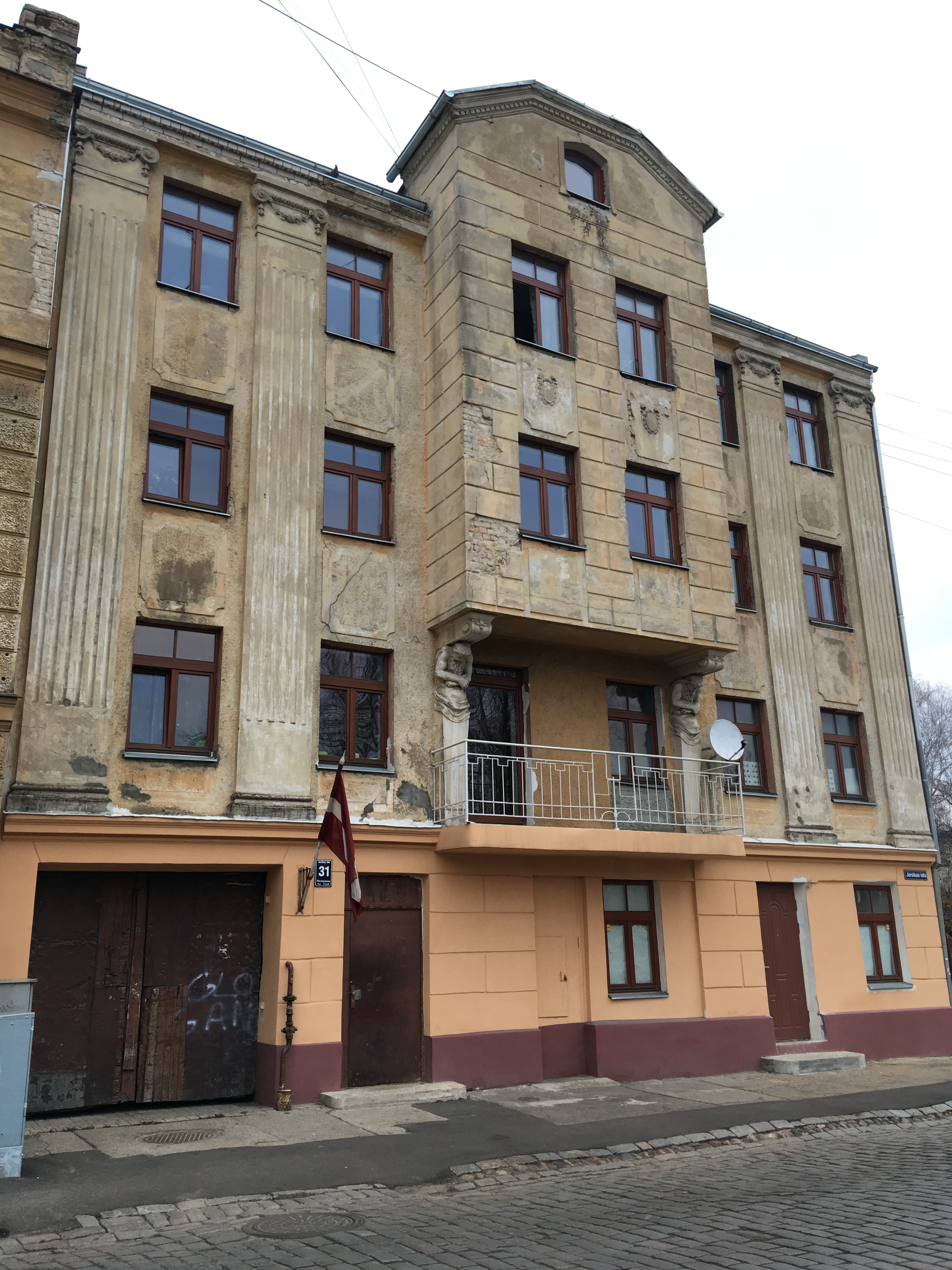 Dzīvojamā ēka Jersikas ielā 31, Rīgā (1914; vietējas nozīmes arhitektūras piemineklis (Nr. 7822))